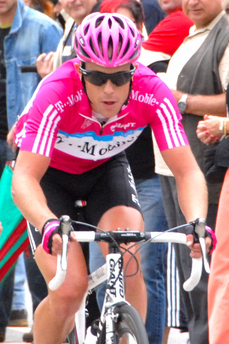 National Meeschterschaft op der Strooss 2007, Course en Ligne, de Kim Kirchen uewen um Keeler Poteau.